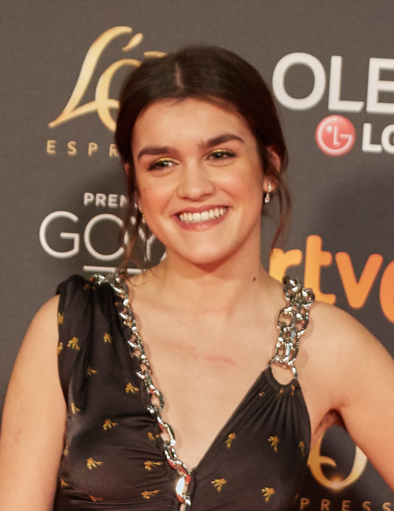 Amaia Romero en la alfombra roja de los Premios Goya celebrados en Sevilla en Febrero 2019